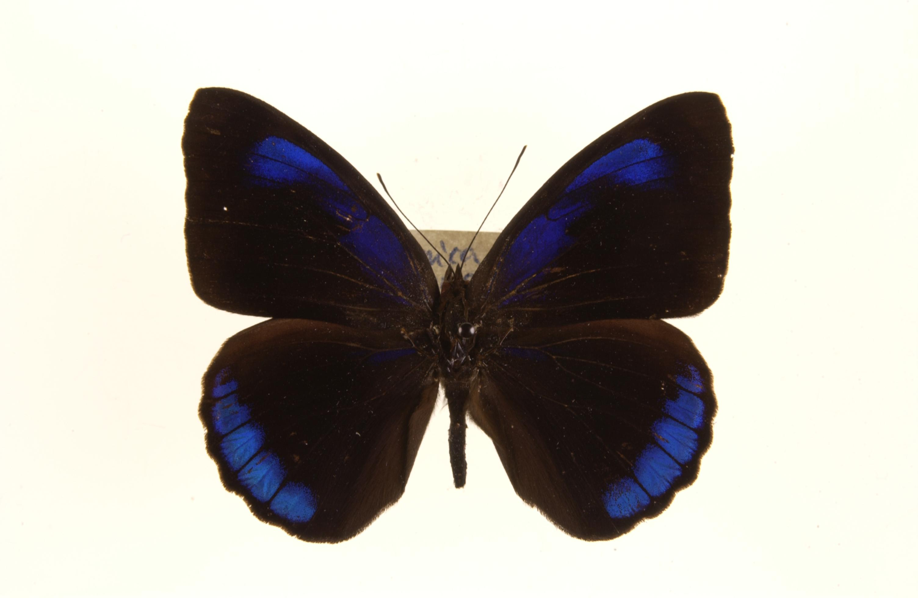 Eunica alcmena Male